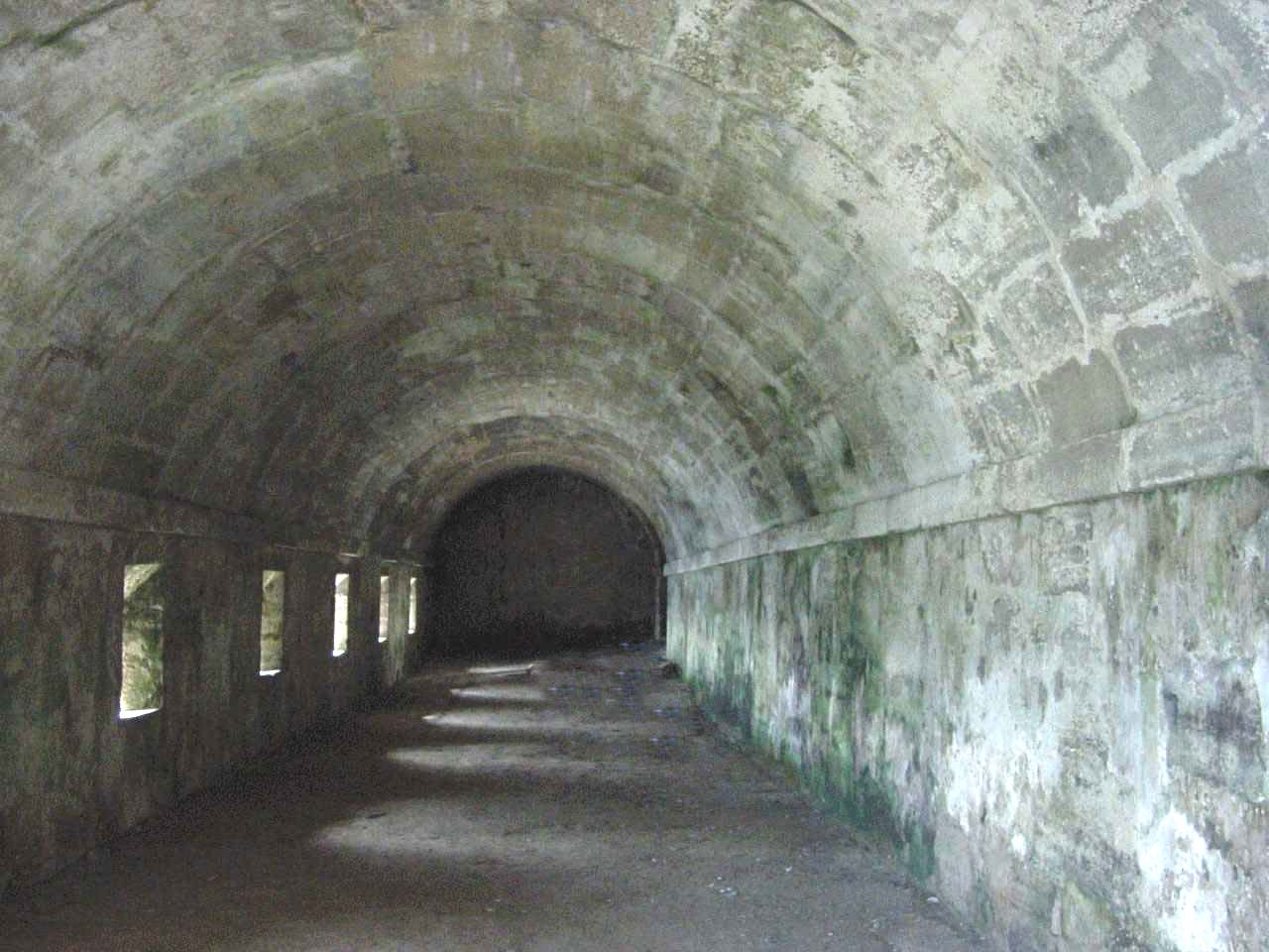 Forte de São Sebastião, freguesia de Nossa Senhora da Conceição, cidade e concelho de Angra do Heroísmo, ilha Terceira, Açores: aspecto da galeria.